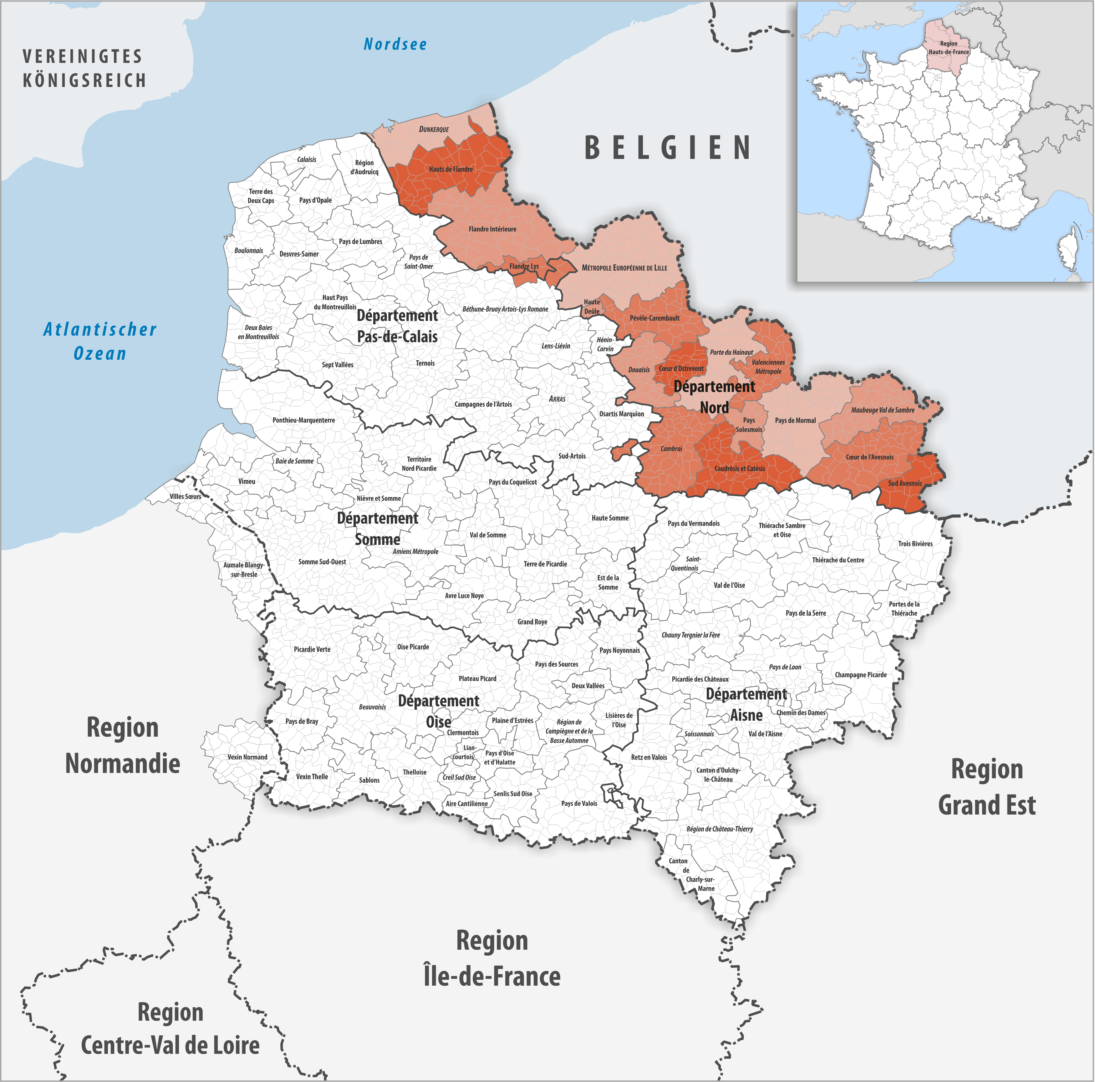 Gemeindeverbände im Département Nord